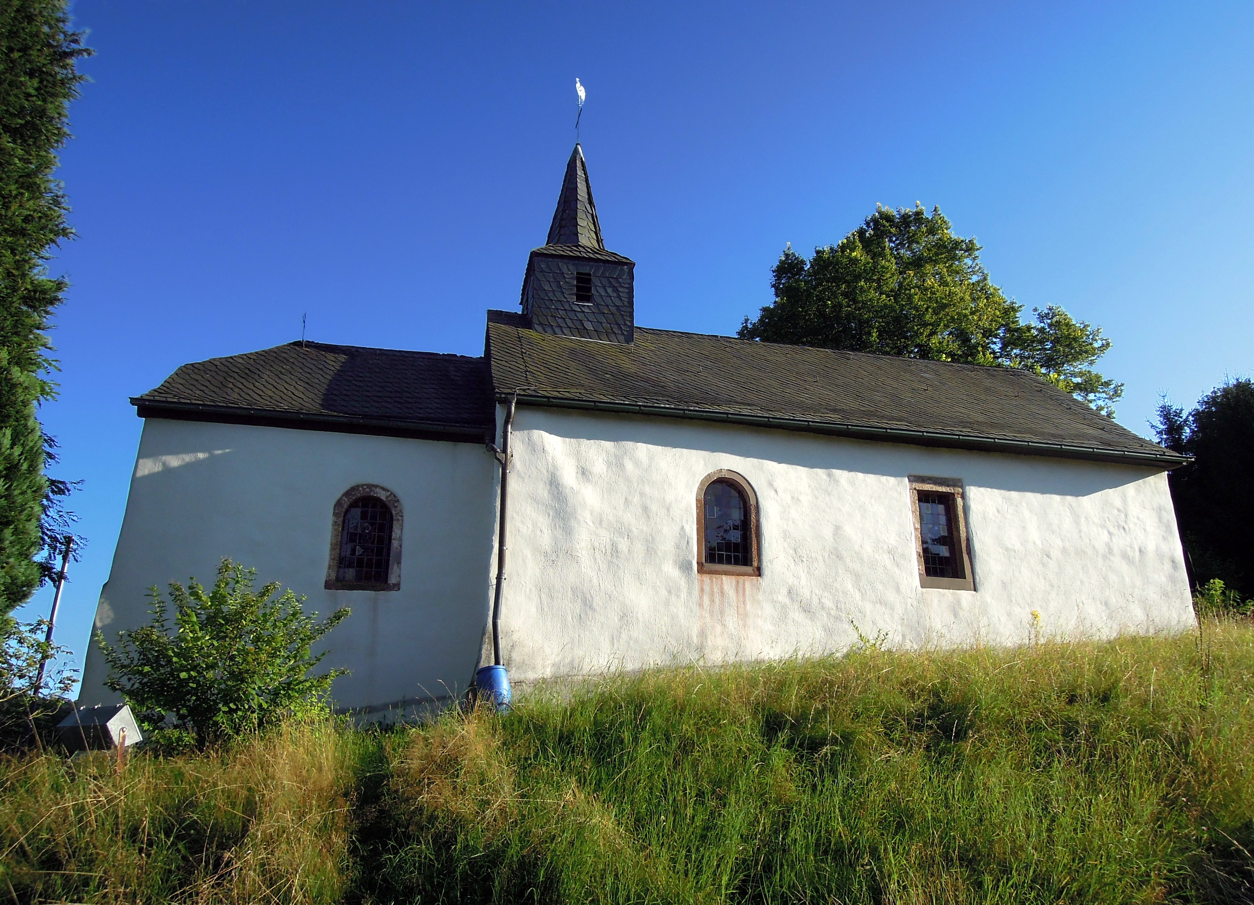 Blick vom Zuweg